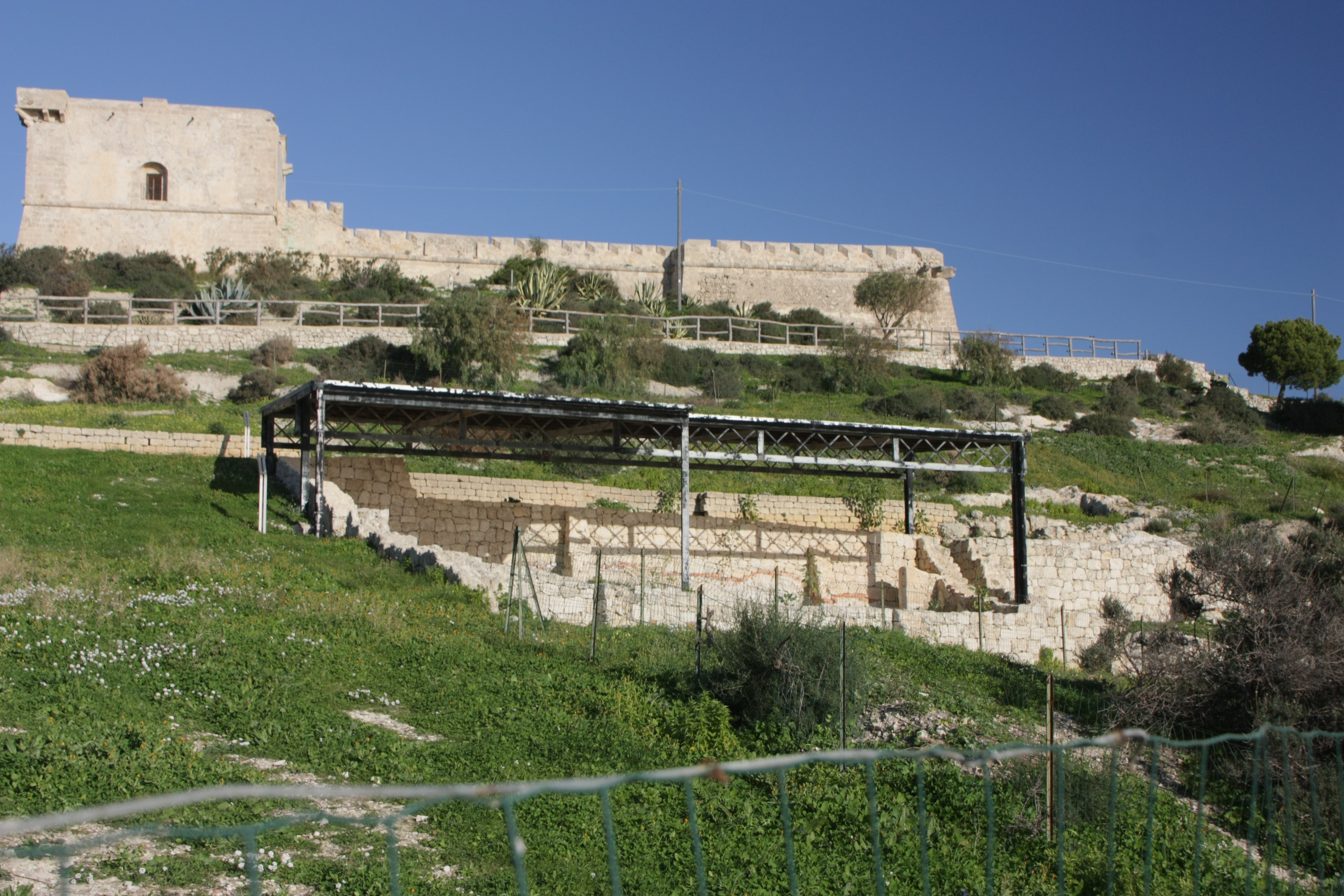 Acropoli di Licata